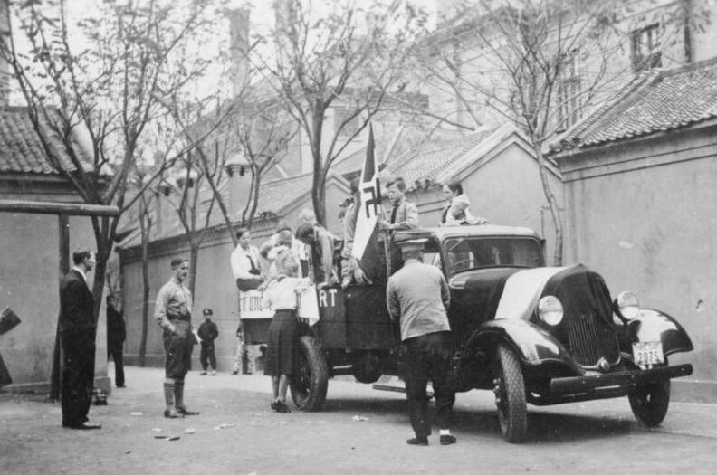 Tientsin, HJ sammelt für das Winterhilfswerk Tientsin, HJ sammelt für das Winterhilfswerk 1934/35 [Foto erworben durch NSDAP Shanghai] [China, Tientsin.- HJ auf LKW sammelt für das Winterhilfswerk]